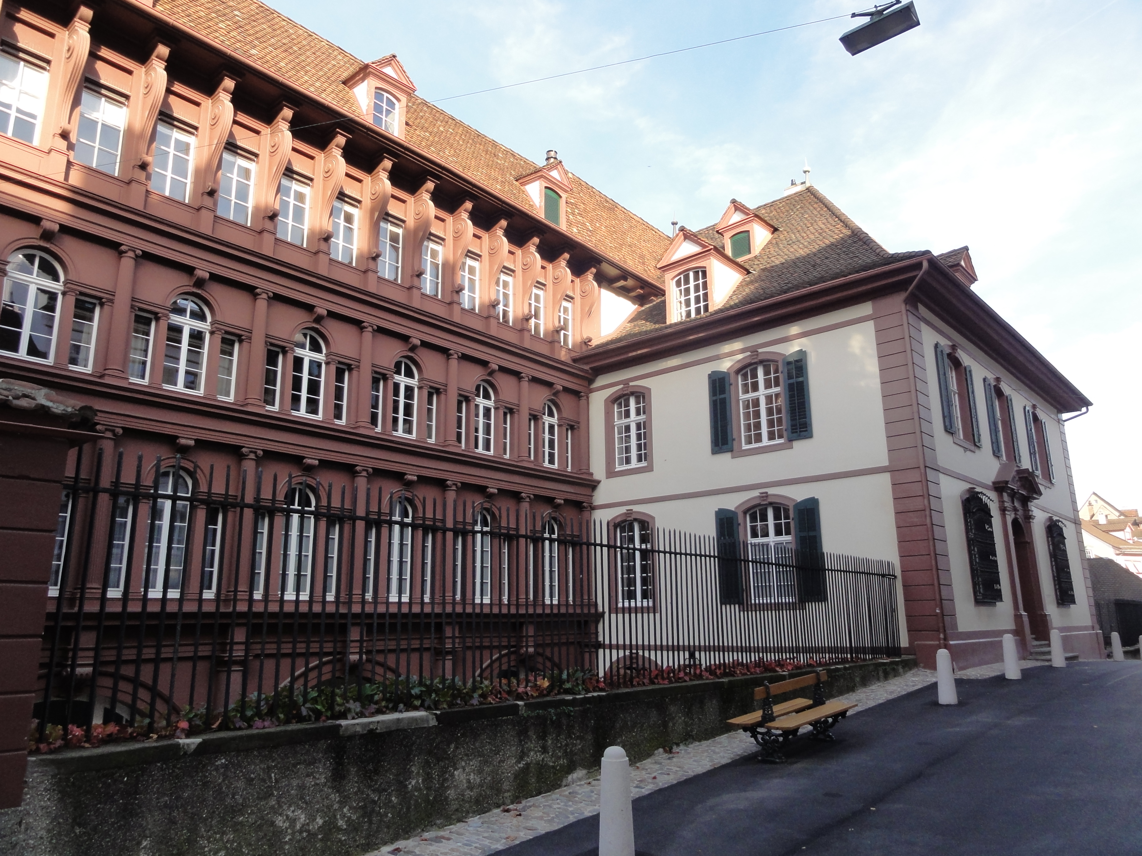 Basel — Heuberg 7 (Spiesshof)